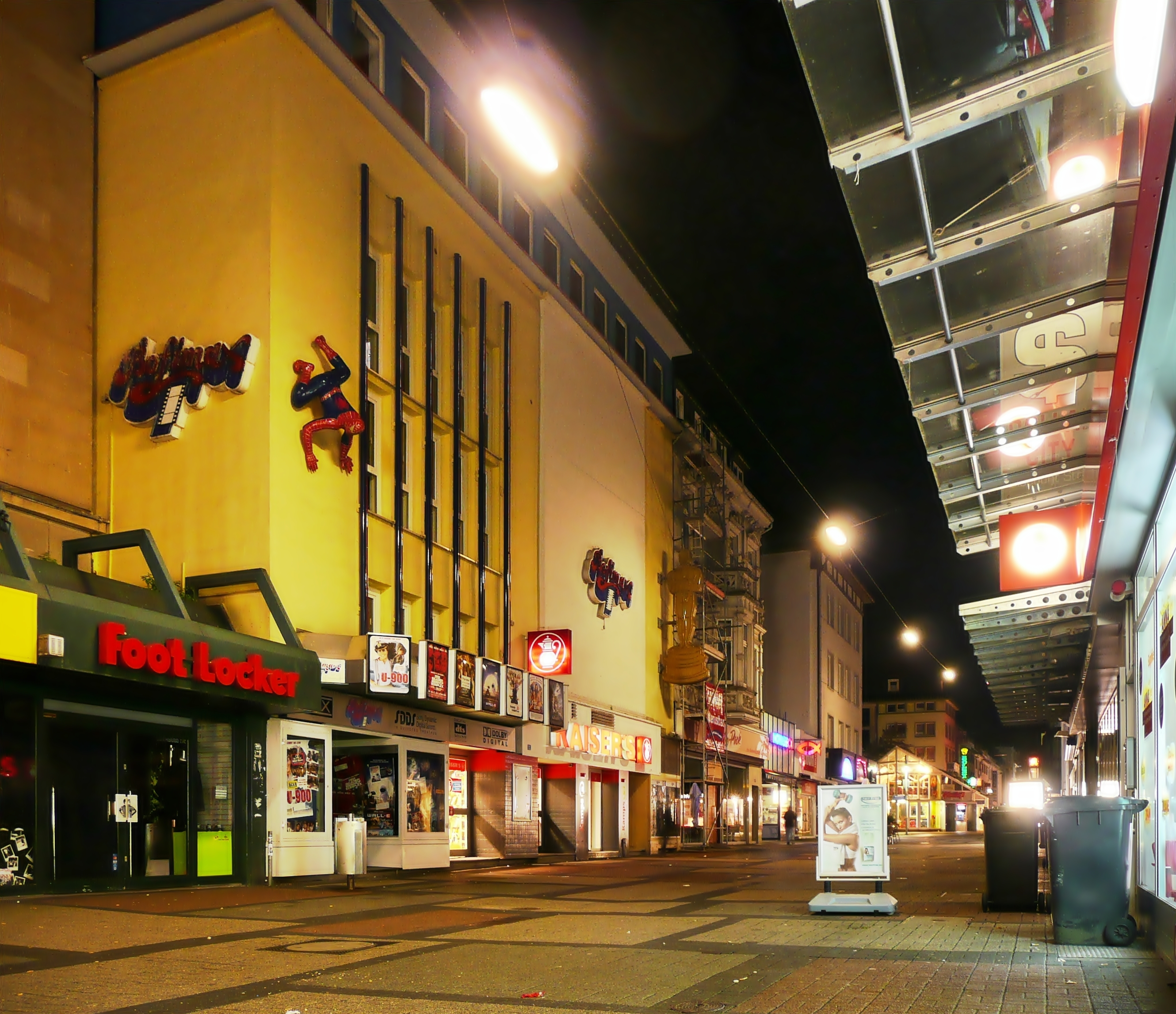 Kino Bofi